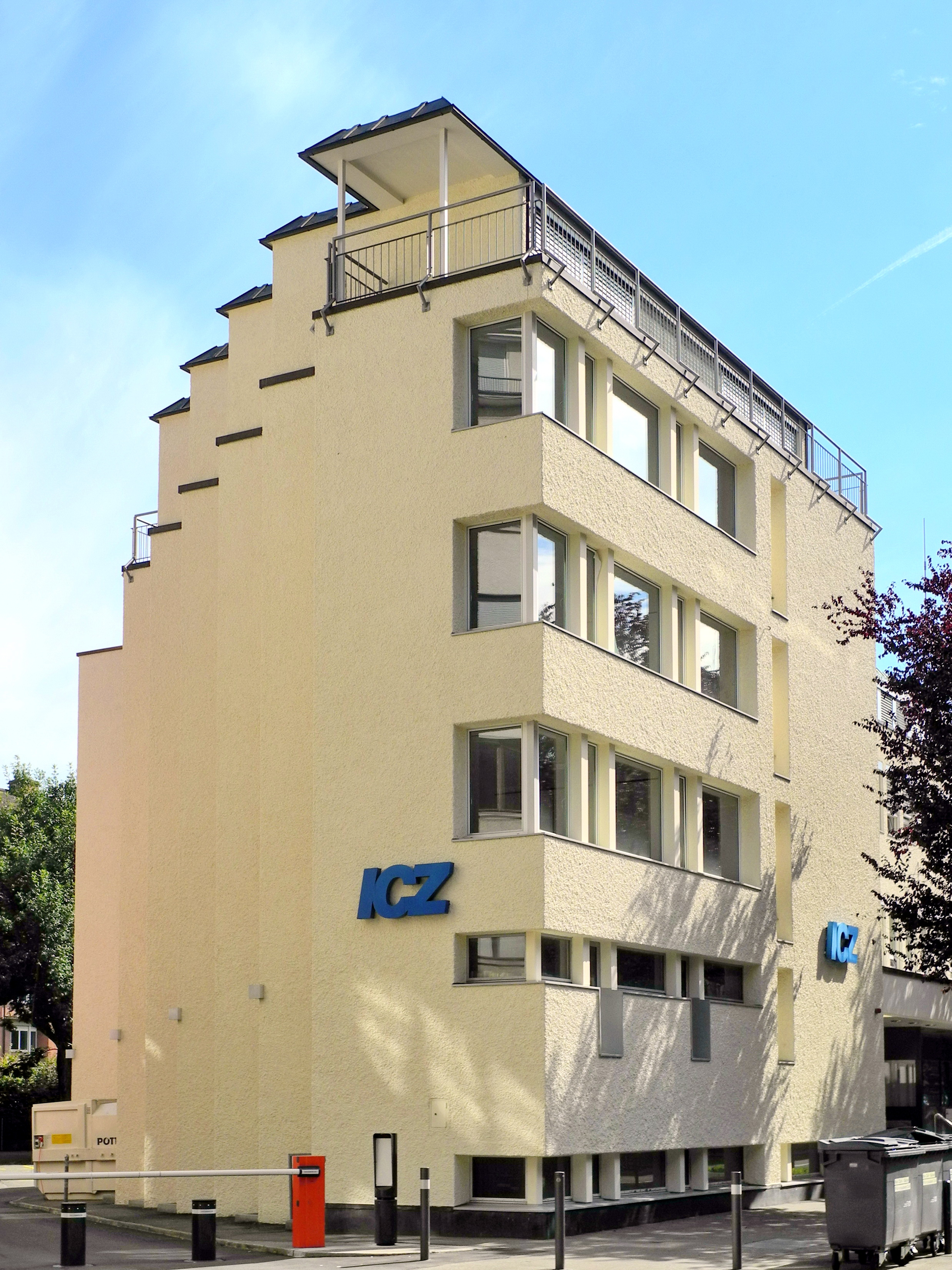 Bibliothek der Israelitischen Cultusgemeinde Zürich